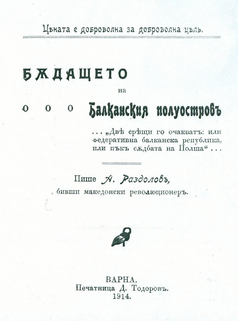 Корица на "Бъдещето на Балканския полуостров" на Атанас Раздолов